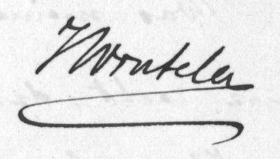 Unterschrift von Jost Winteler (1846–1929) auf einem Brief vom 2. Januar 1876 (Archiv des Schweizerischen Idiotikons in Zürich).